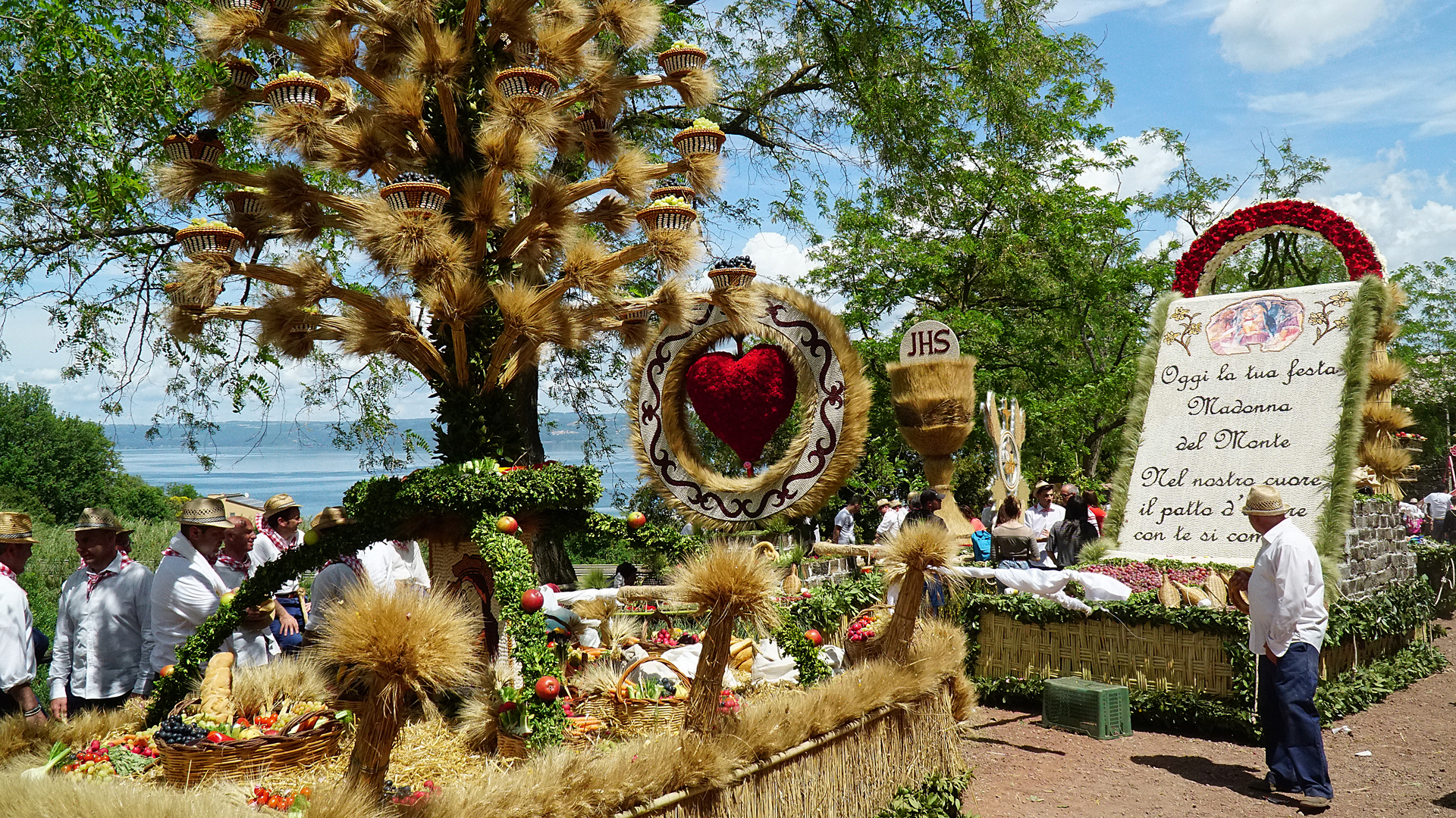 Uno dei carri dei bifolchi